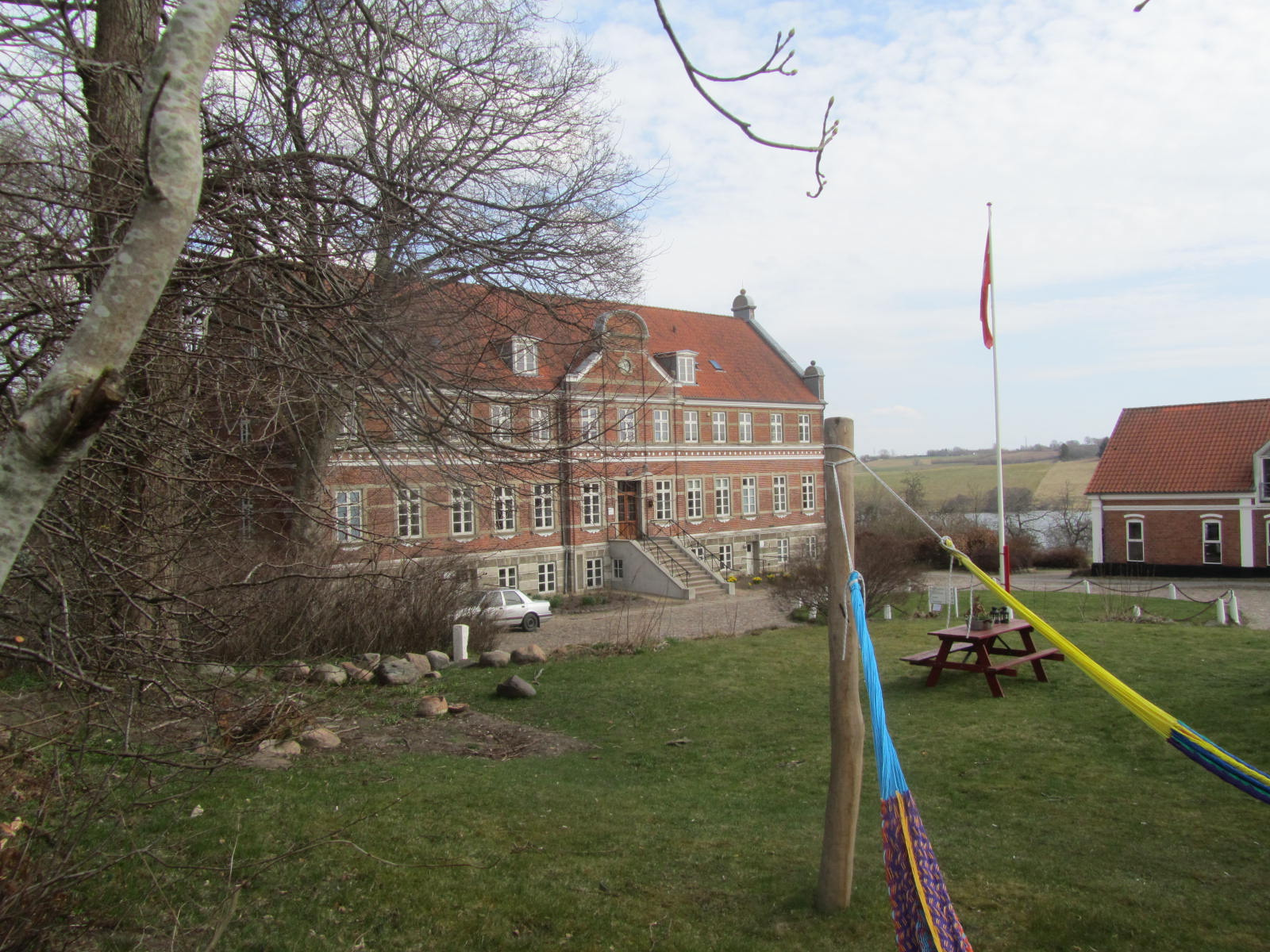 Faarupgaard set fra nordvest med Fårup Sø i baggrunden